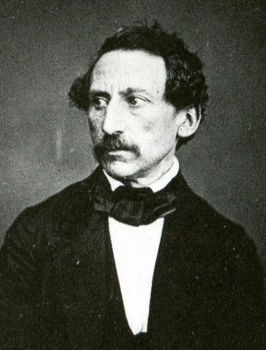 Porträt des Malers Louis Asher (1804-1878)